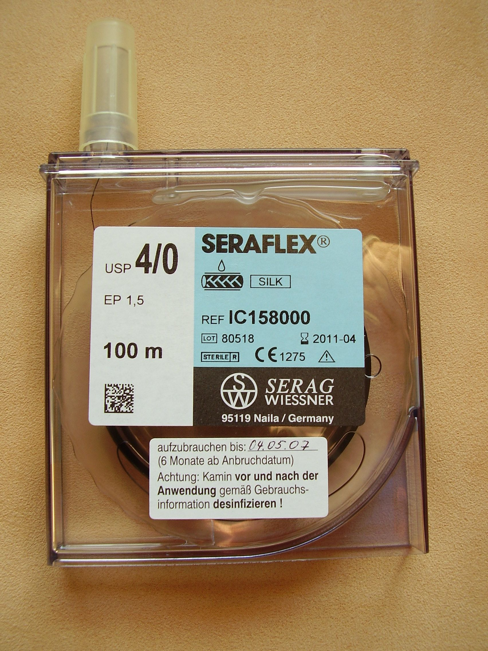 suture material, nahtmaterial Meterware, steril, 4x0, Seraflex, 100 m